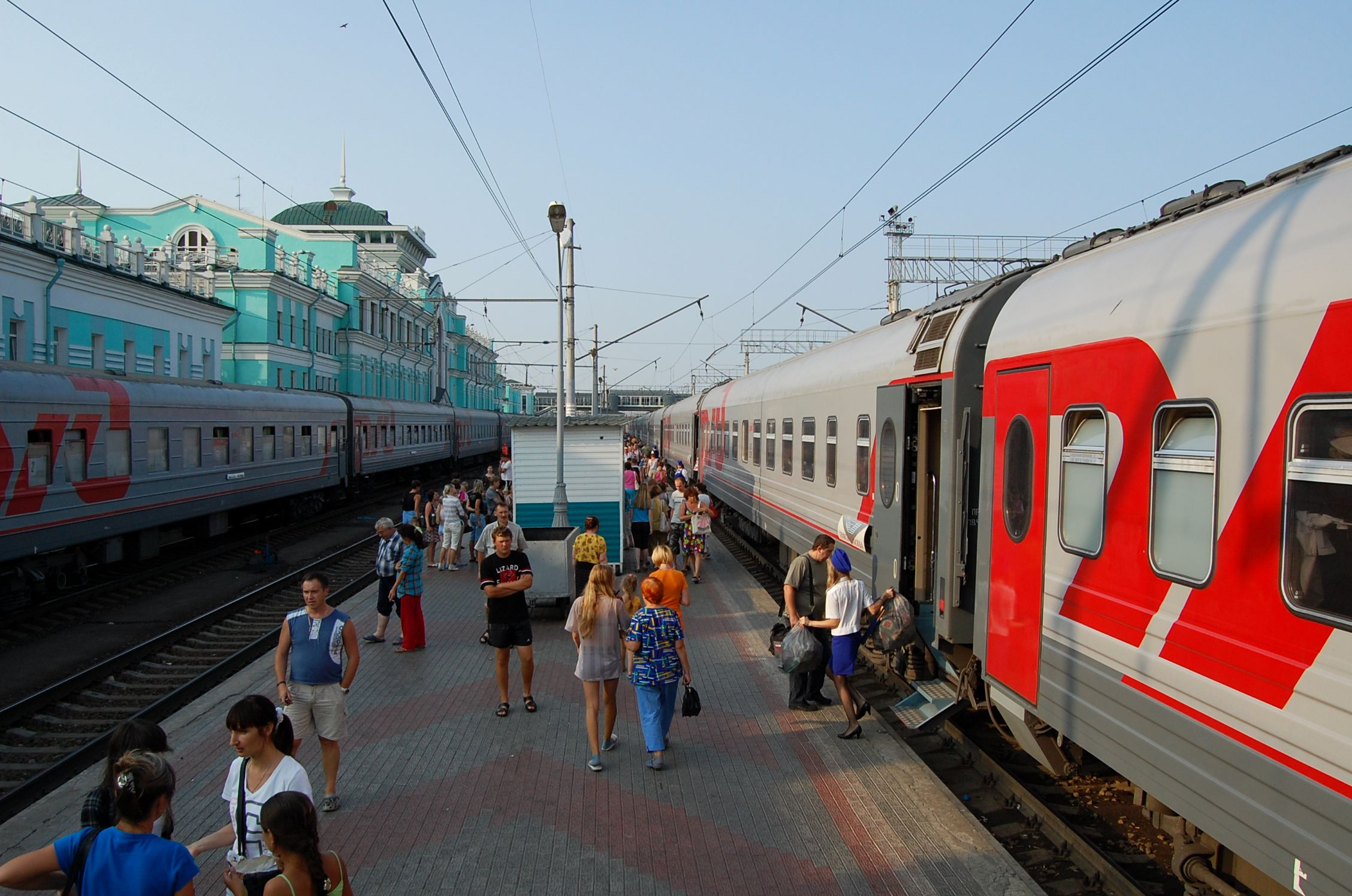 Gare de Omsk